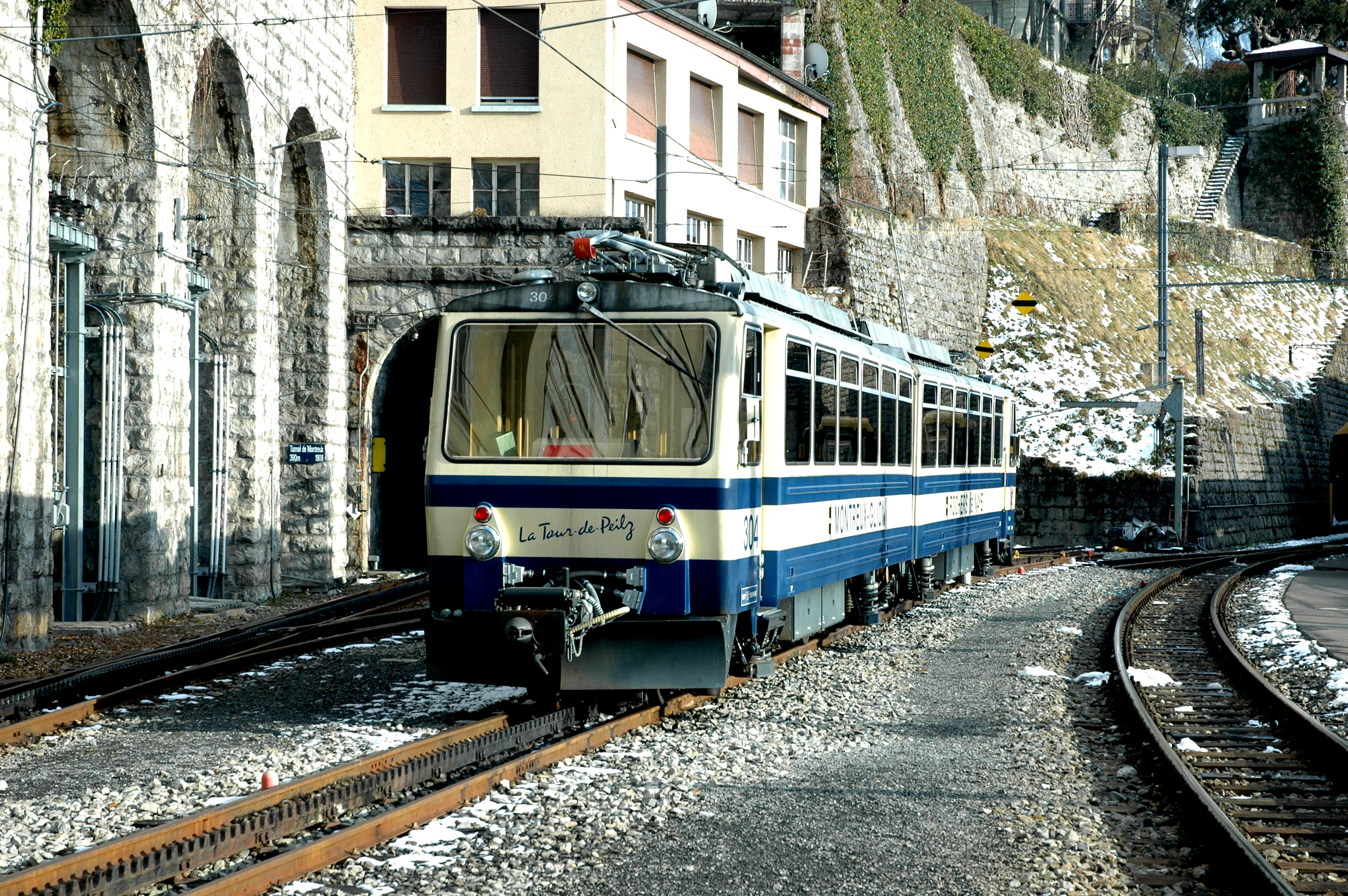 Transports Montreux-Vevey-Riviera trein Bhe 304 op 2 maart 2006 te Montreux.